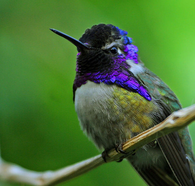 Colibri (image Commons recadrée) License: Public domain